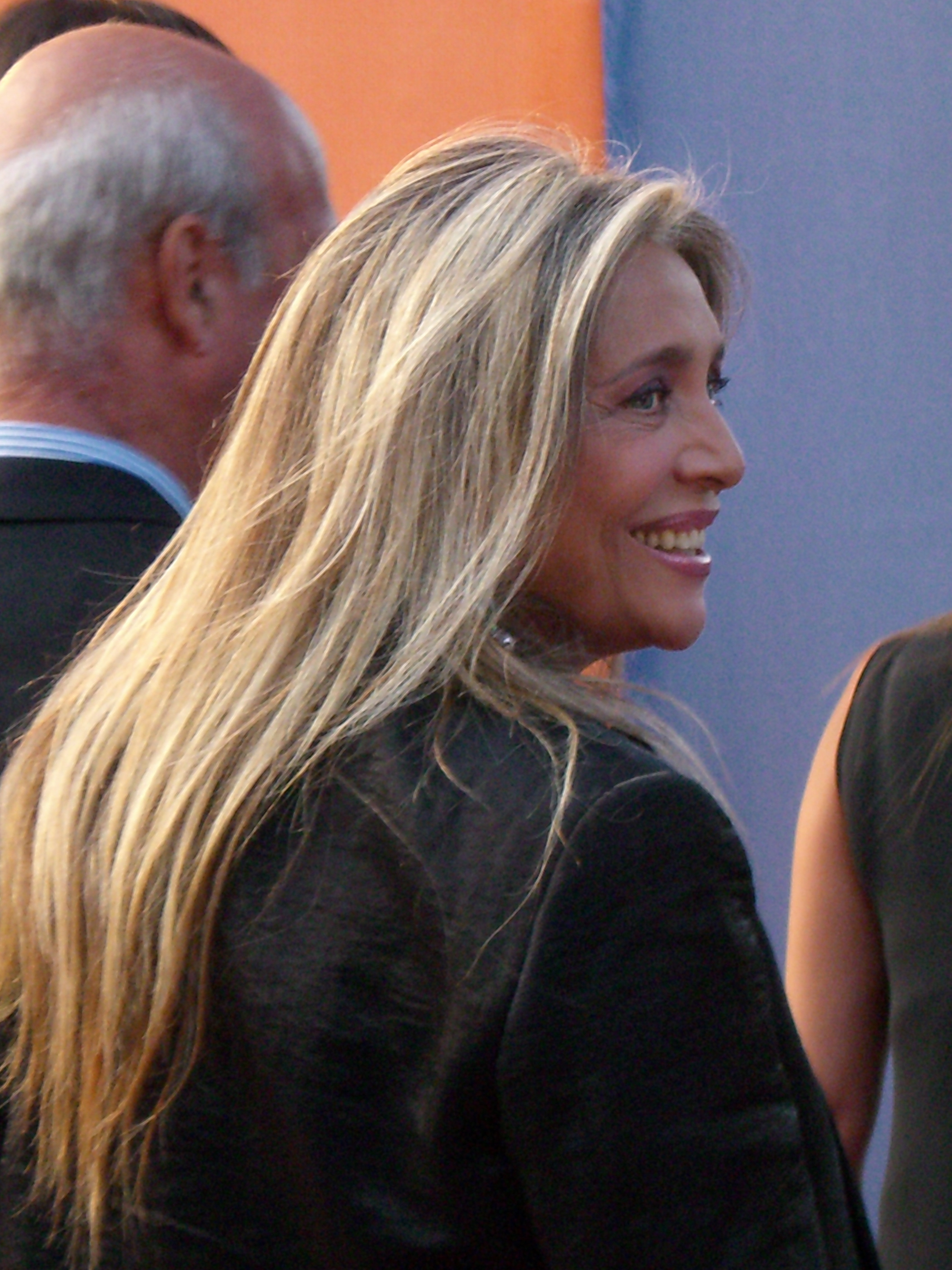 La presentatrice italiana Mara Venier.